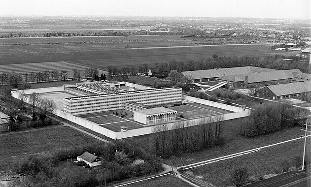 Quang cảnh nhà tù thứ hai, được xây dựng vào năm 1969, phía trước nhà máy gạch lịch sử. Nhà của cựu chỉ huy ở phía trước.